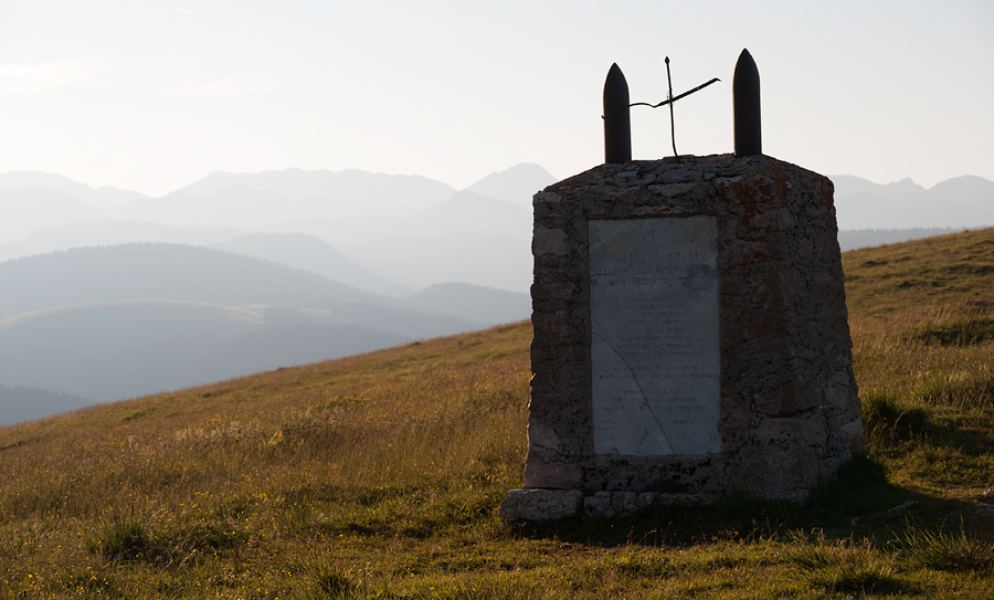 Monumento Raffaele Stasi - Melette